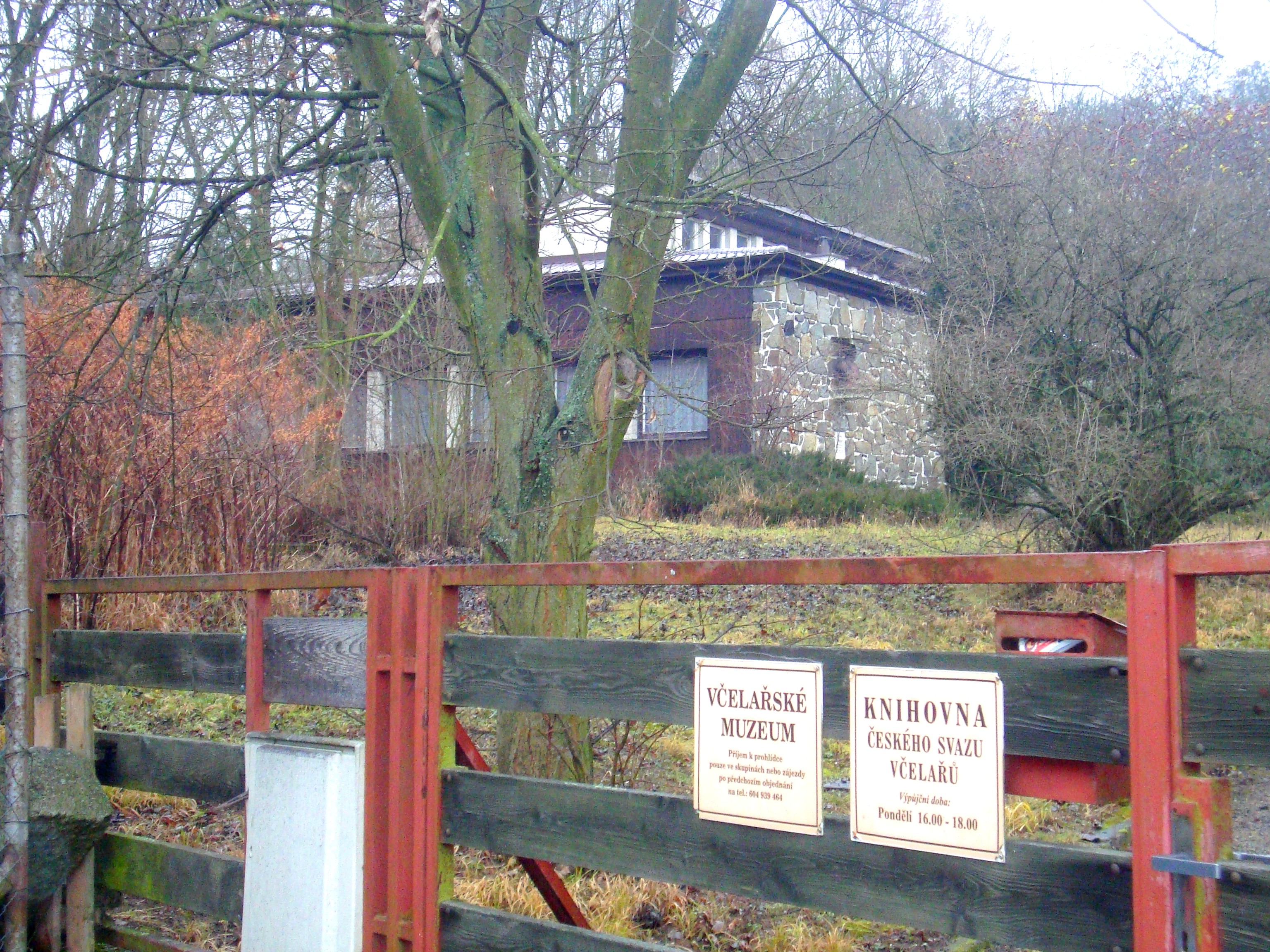 Včelařské muzeum Rosice - vstupní brána a budova muzea